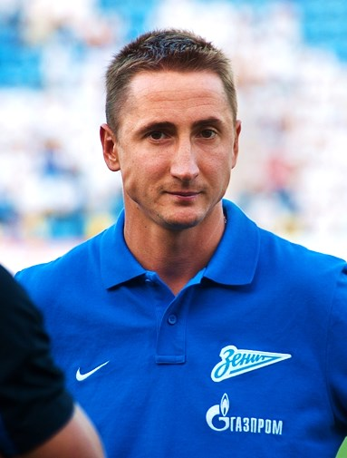 Владимир Быстров